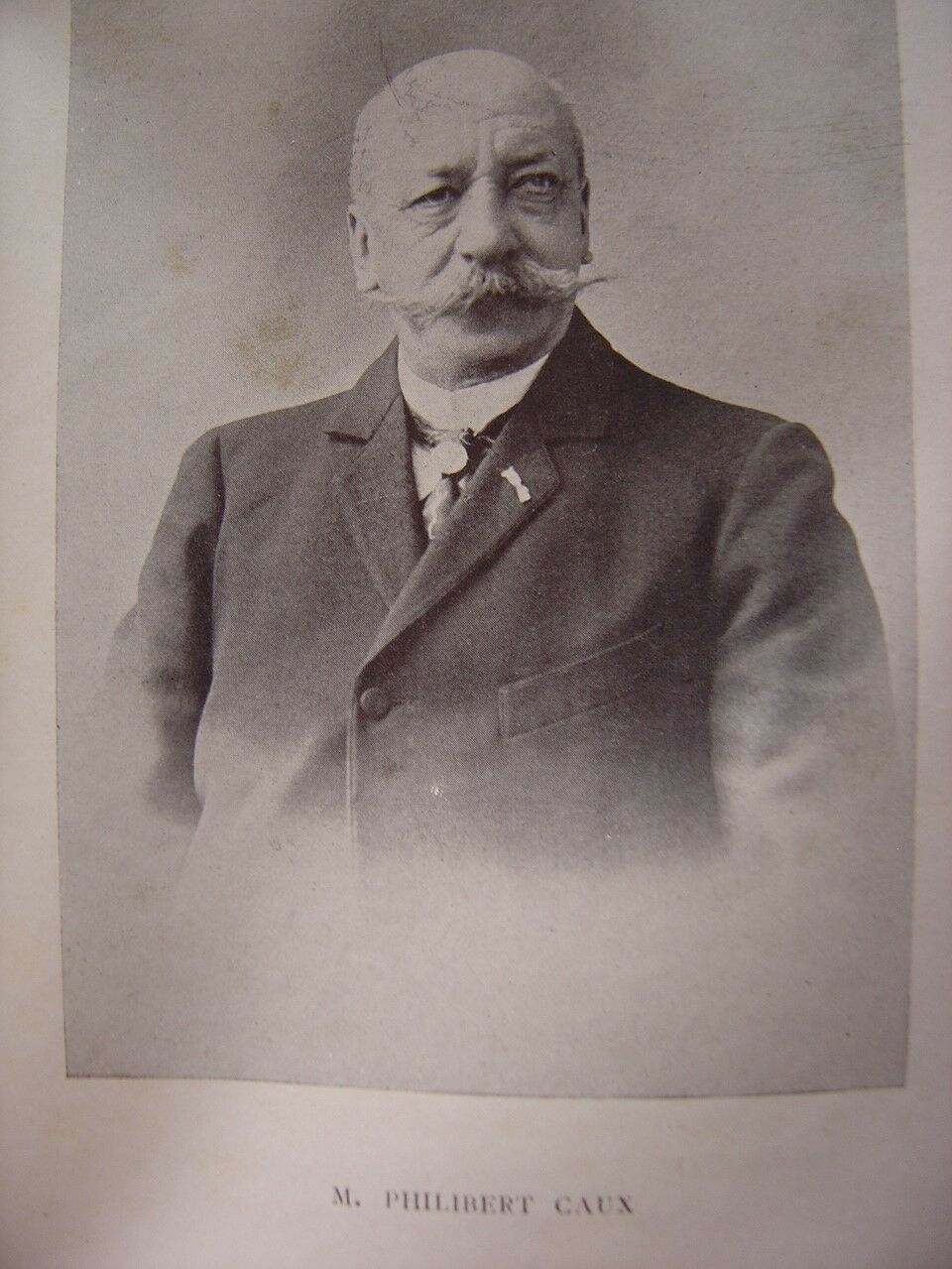 Ancien maire de Bihorel (Seine-Maritime)